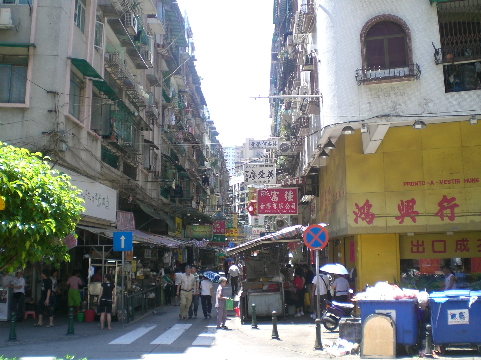 嘉路米耶圓形地（Rotunda de Carlos da Maia），又名 三盞燈，是位於澳門聖安多尼堂區的一個圓形廣場，鄰近高士德大馬路及亞利鴉架街等。 Photo author= Mo707